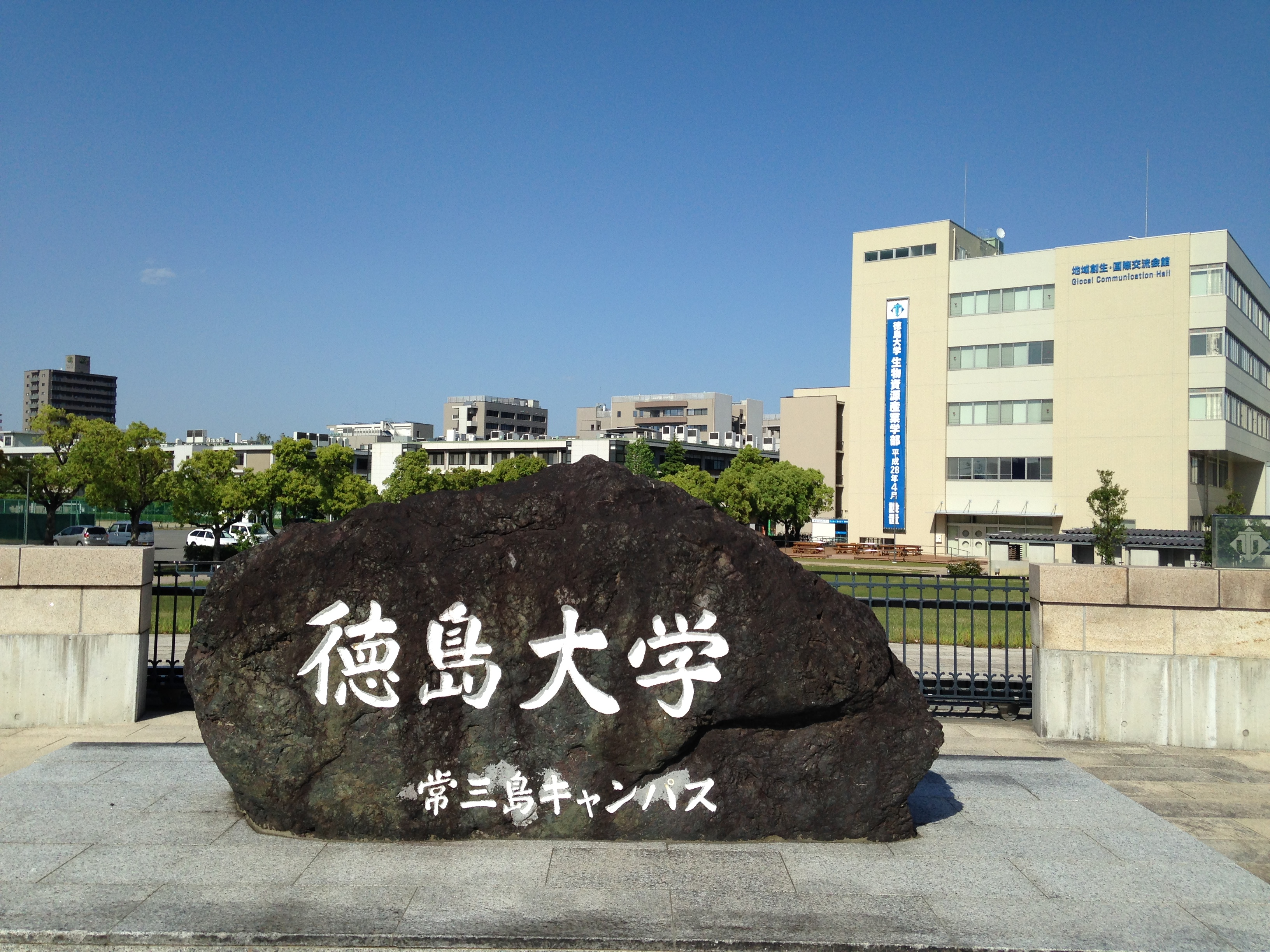 徳島大学常三島キャンパス